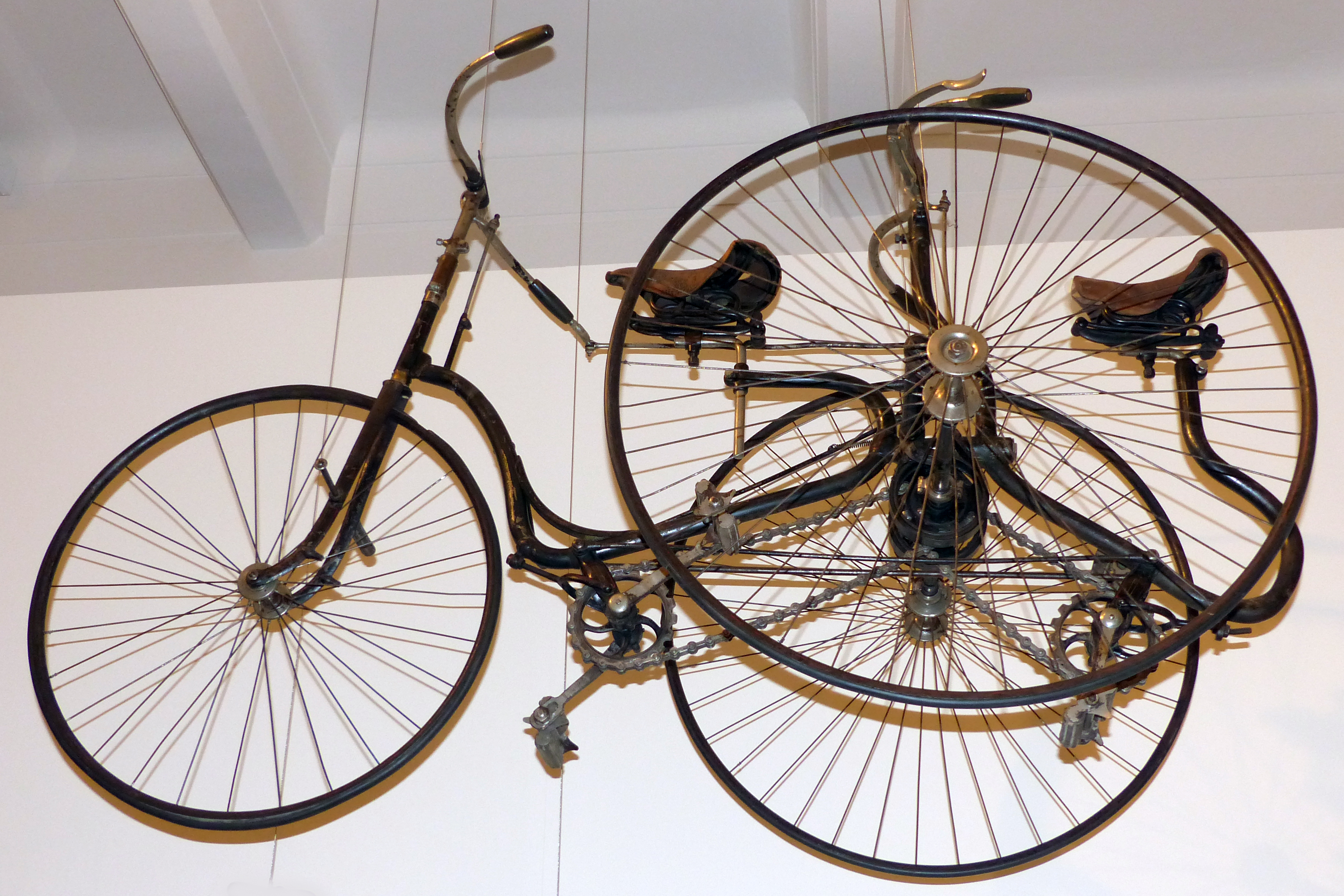 Doppelsitzdreirad (Tandem), Coventry Machinists Company, 1890; Exponat im Technischen Museum Wien